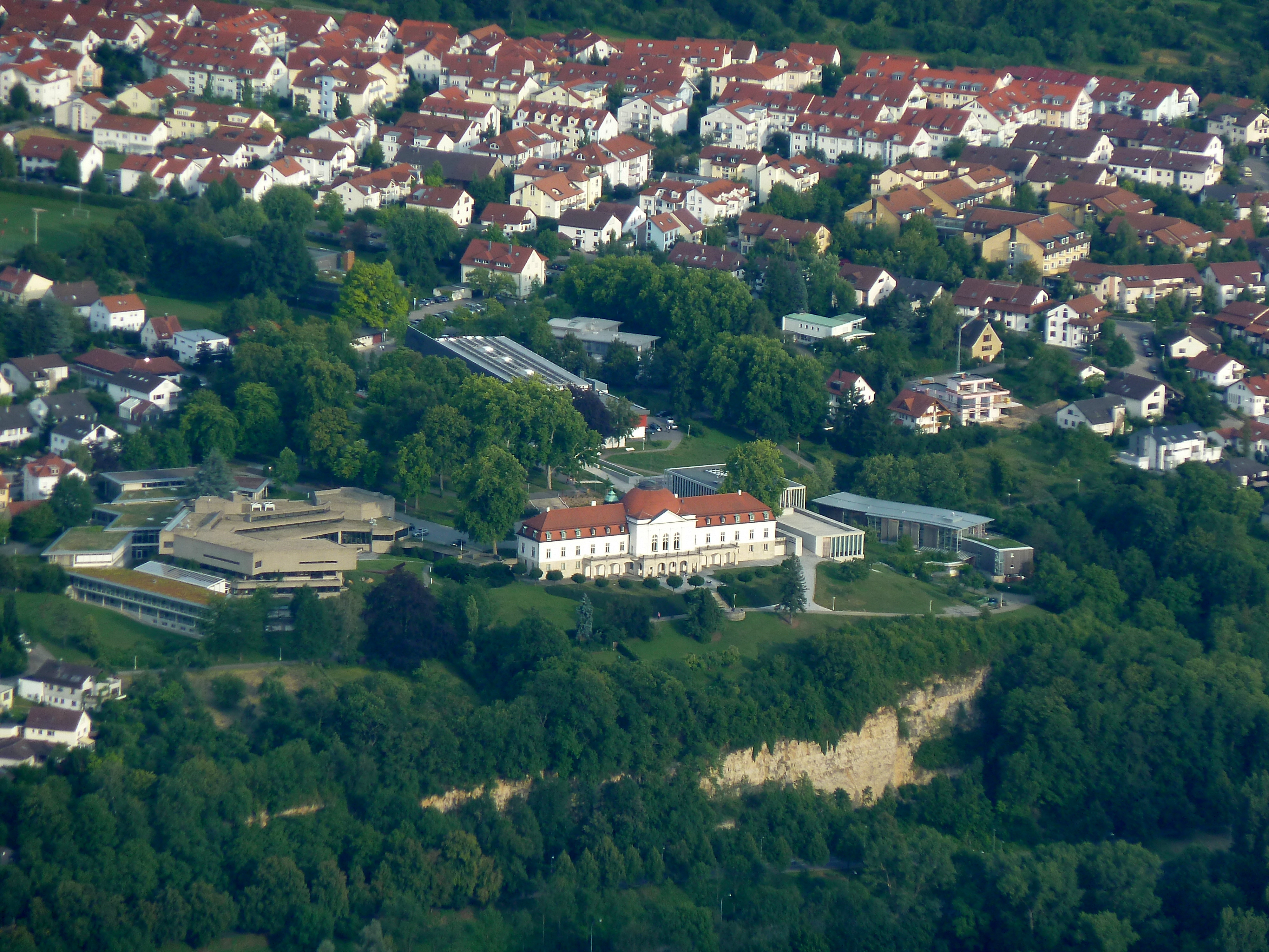 Zu sehen ist die Schillerhöhe Marbach aus der Luft. Links ist das Deutsche Literaturarchiv Marbach, rechts daneben das Schiller-Nationalmuseum und ganz rechts das Literaturmuseum der Moderne.